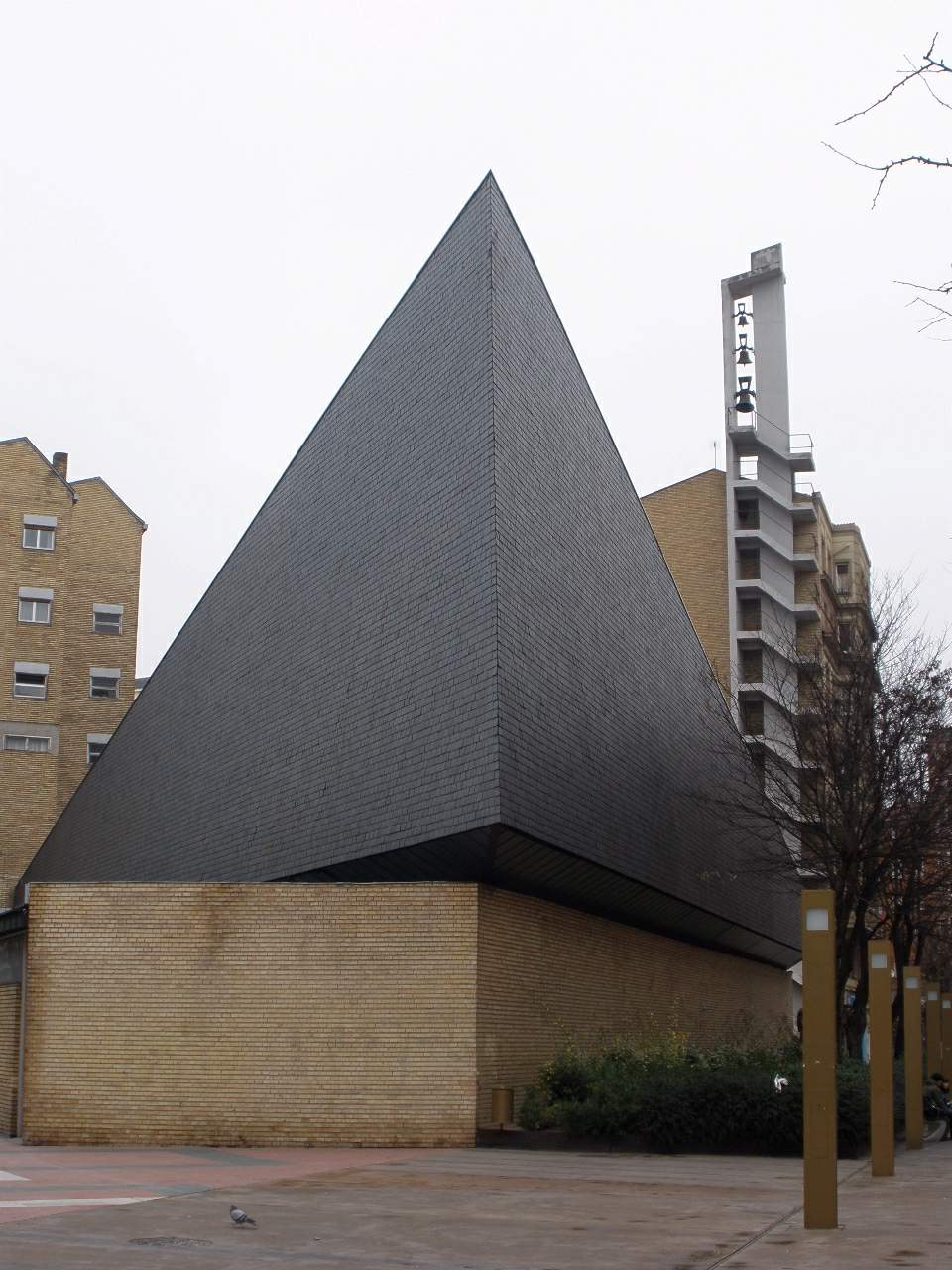 Iglesia de Santa María de Los Ángeles, en Vitoria-Gasteiz